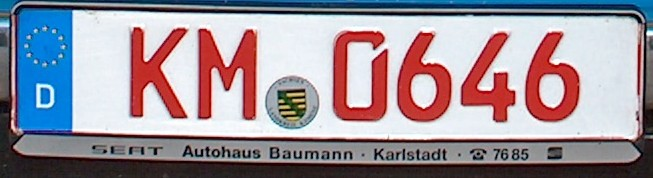 Rotes Kennzeichen, hier KM = Kamenz